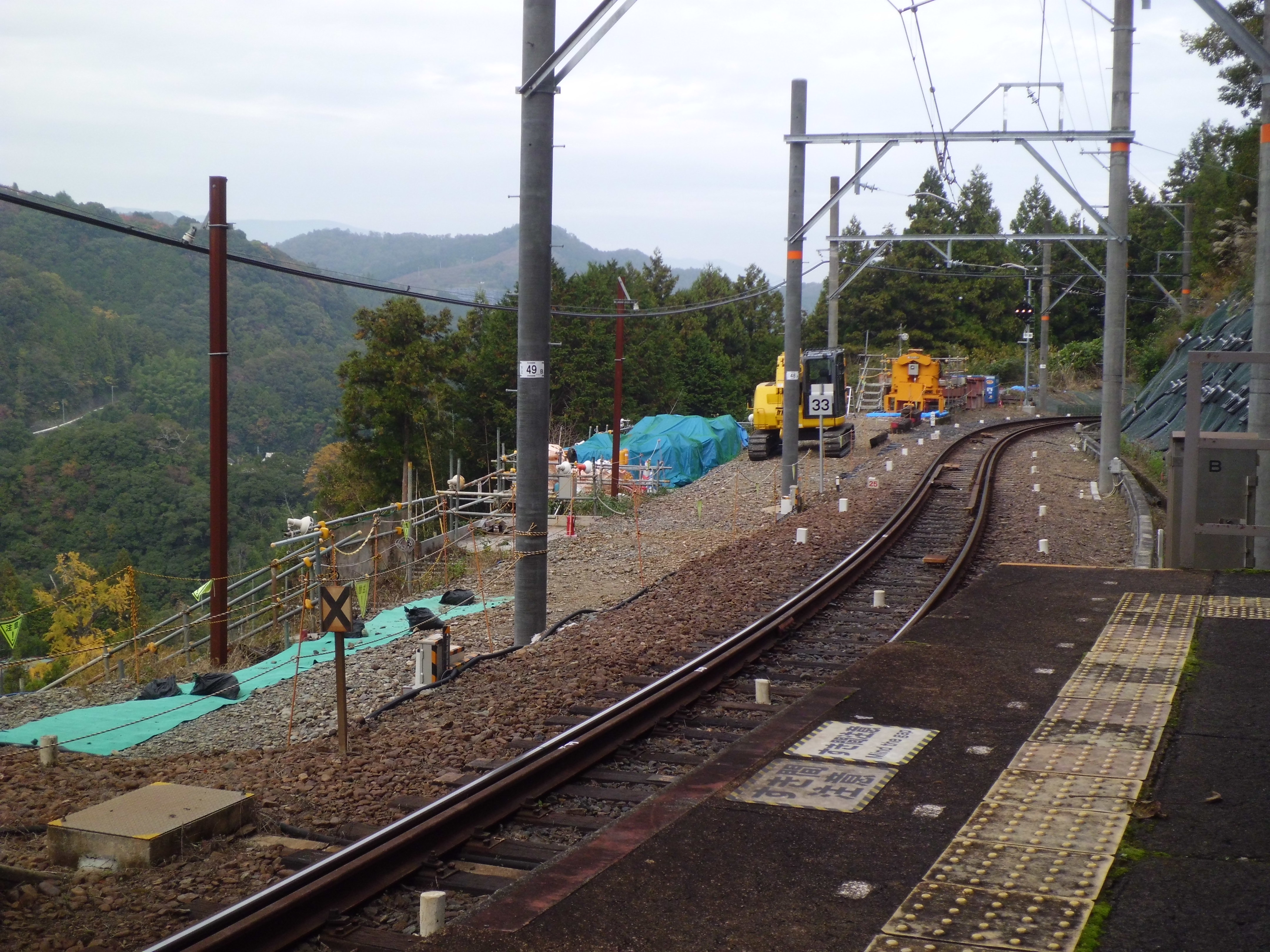 上古沢駅地滑り対策工事中